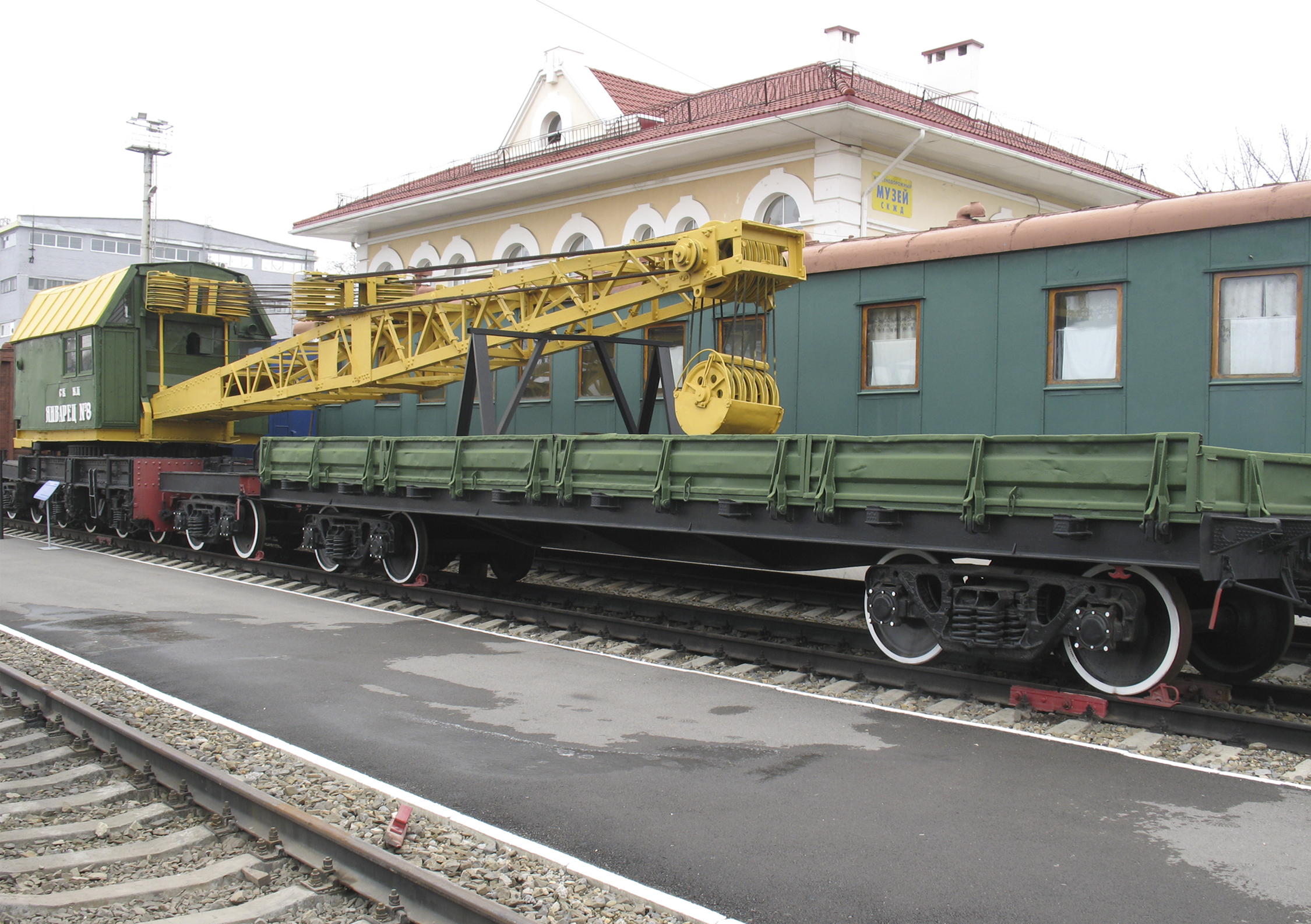 Построен в 1935 году Одесским заводом «Имени ЯНВАРСКОГО ВОССТАНИЯ»